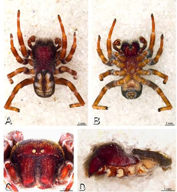 Loureedia annulipes (syn. Stegodyphus annulipes) male